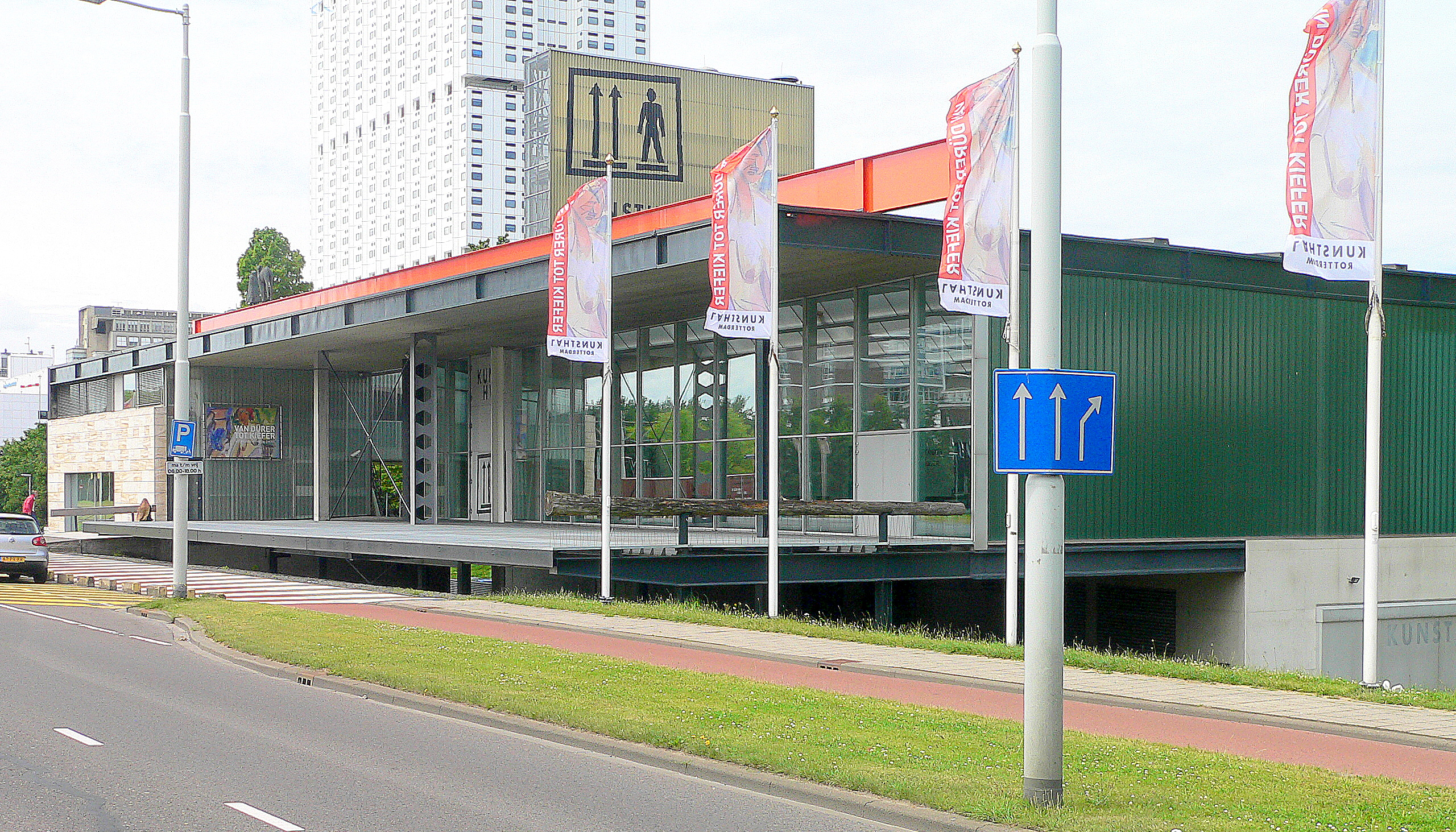 Kunsthal, Rem Koolhaas (1992). Uses the dike in a special way.